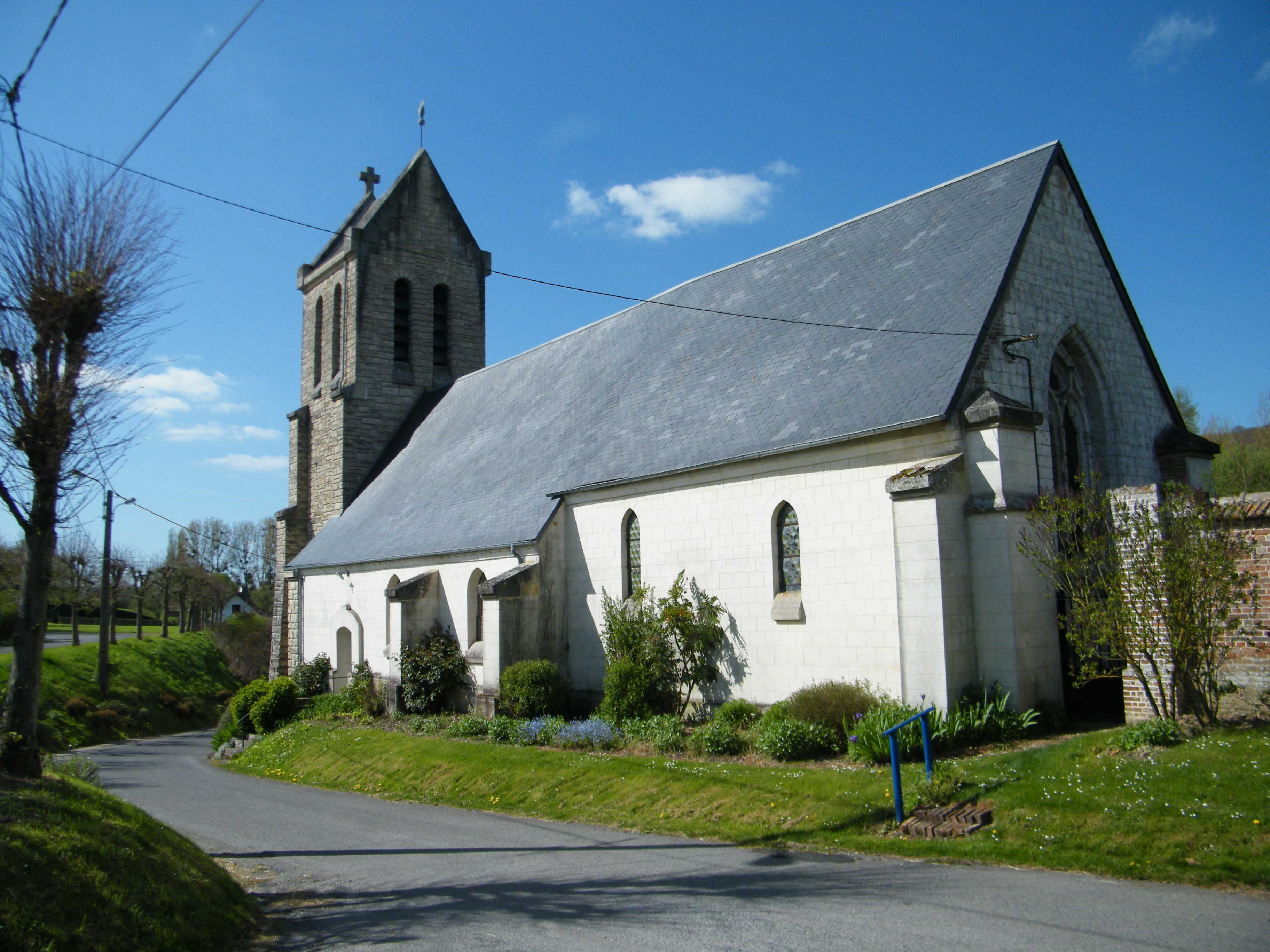 L'église.